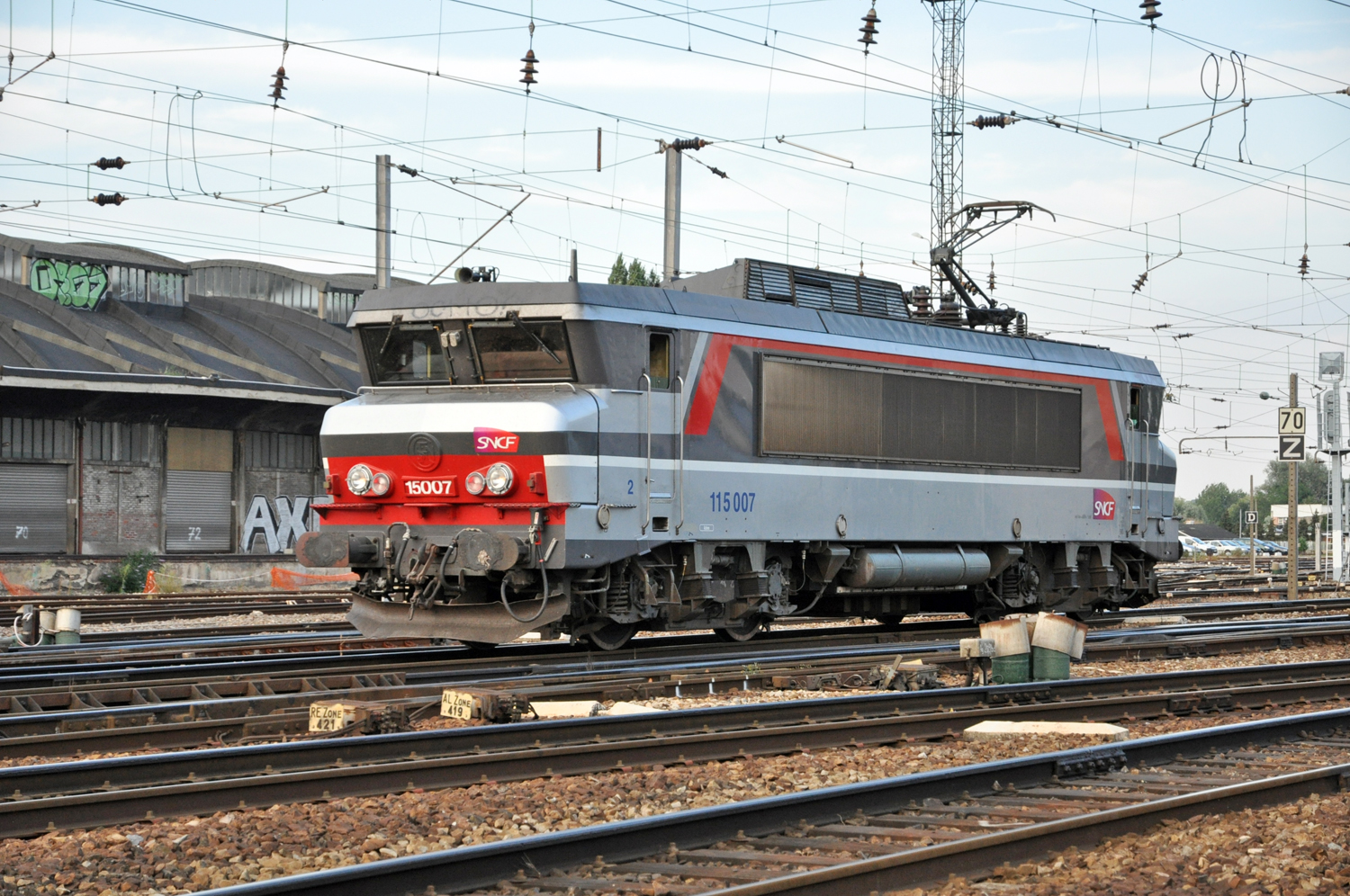 BB 15007 en mouvement en gare d'Amiens